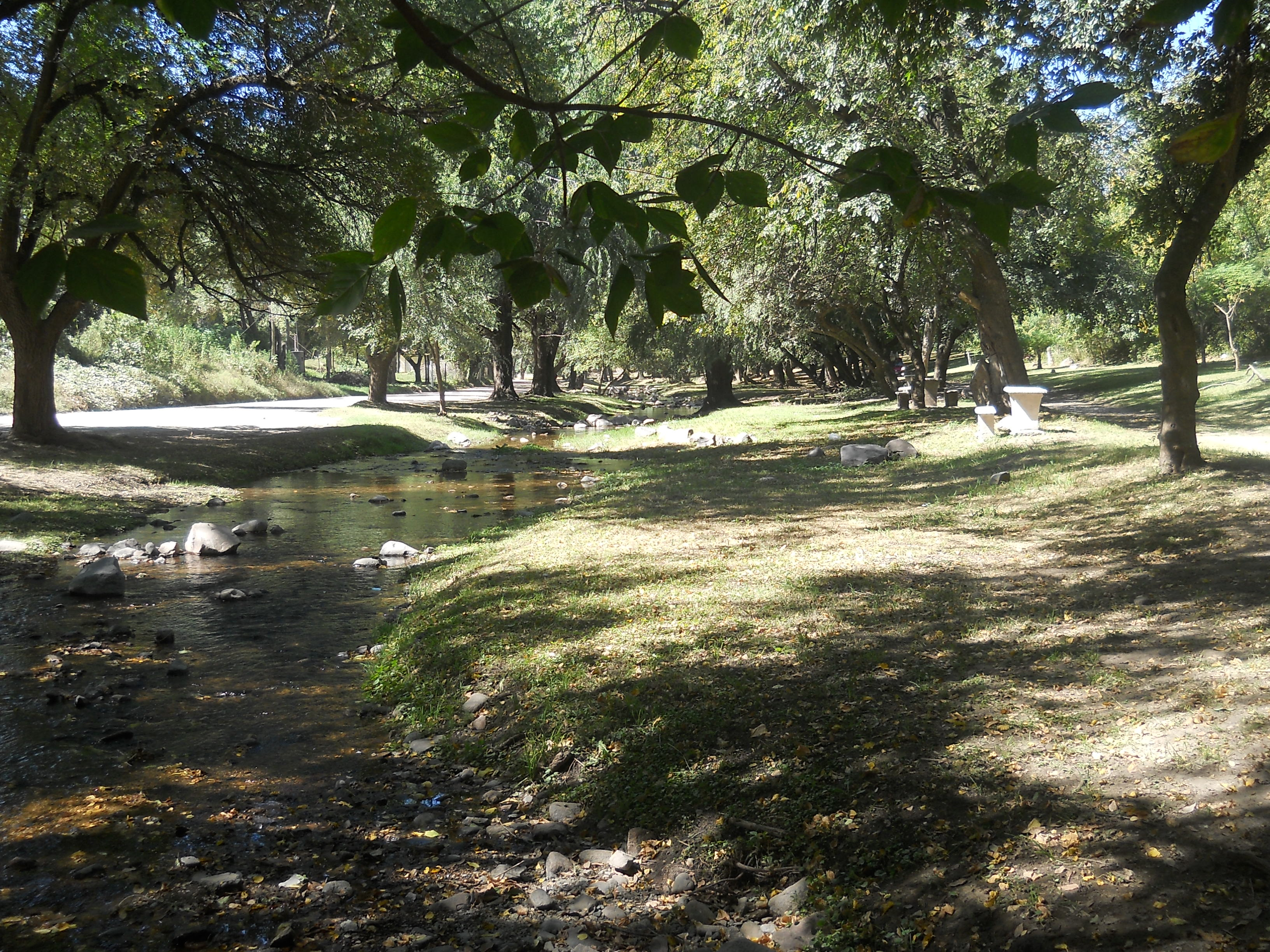 Vista del Arroyo Salsipuedes